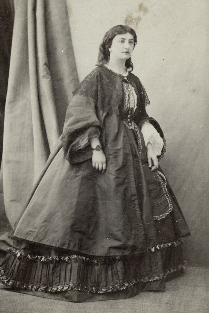 Екатерина Васильевна Орбелиани, ур. Ильинская (1828—1883)